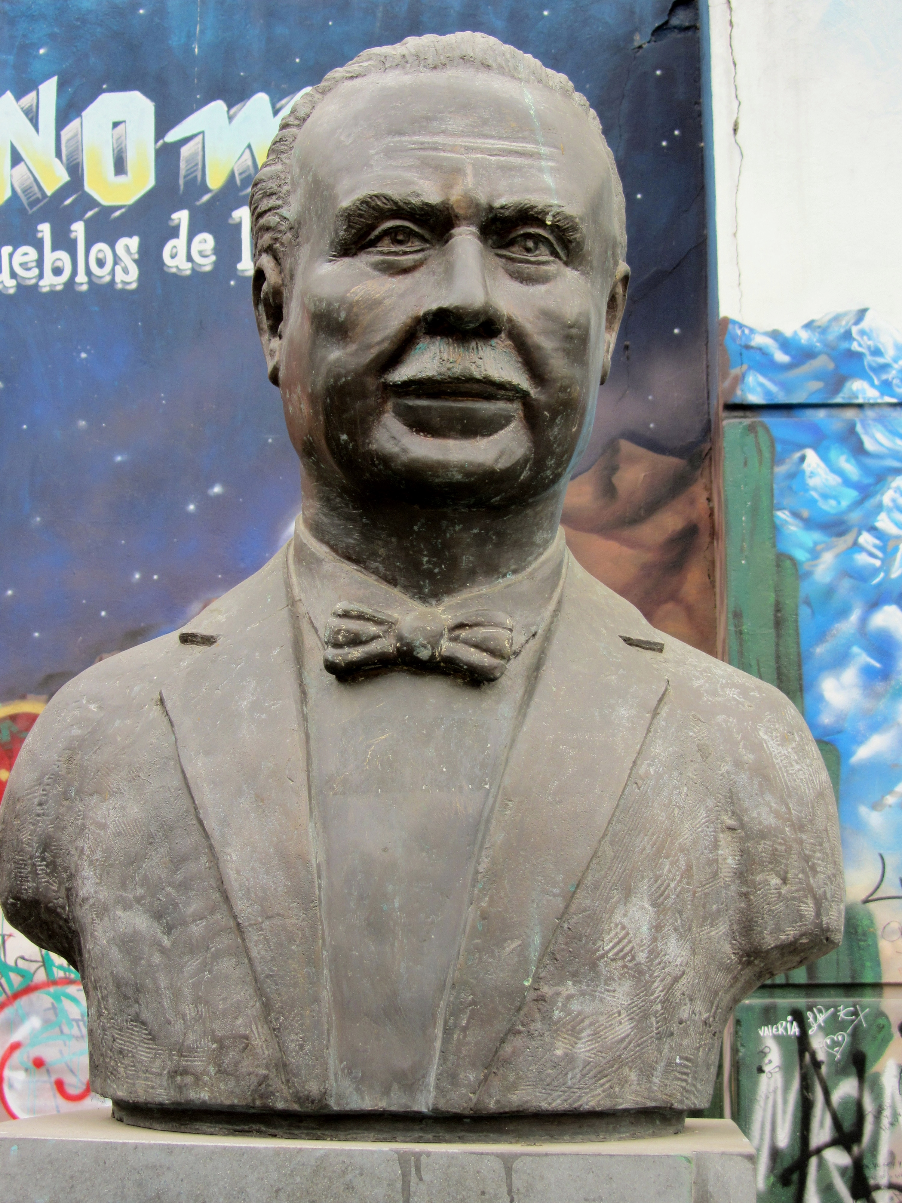 Busto de la poetisa chilena Gabriela Mistral (Fundición Artística Germán Miño) en avenida Matucana, a pasos del metro Quinta Normal.